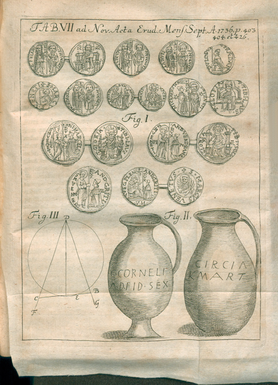 Illustration